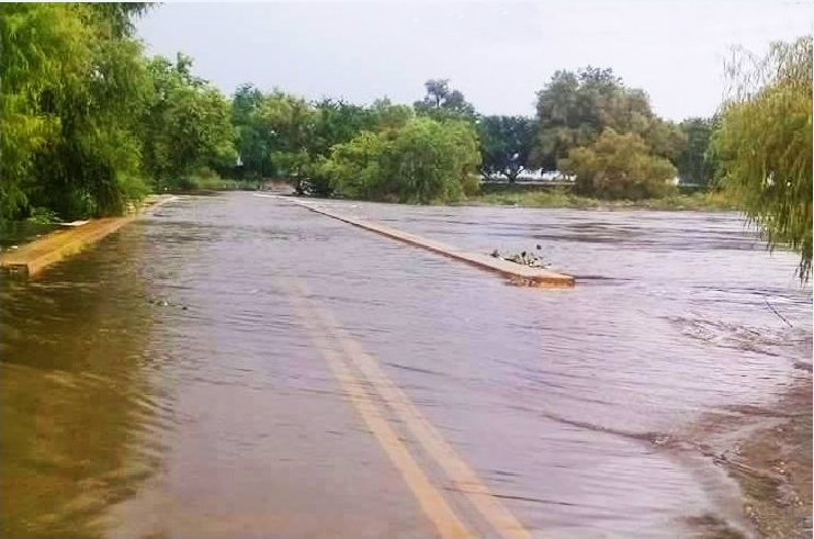 cierre de la circulación por el puente de San Jose de Ahome. Creciente Rio Fuerte septiembre 2015.